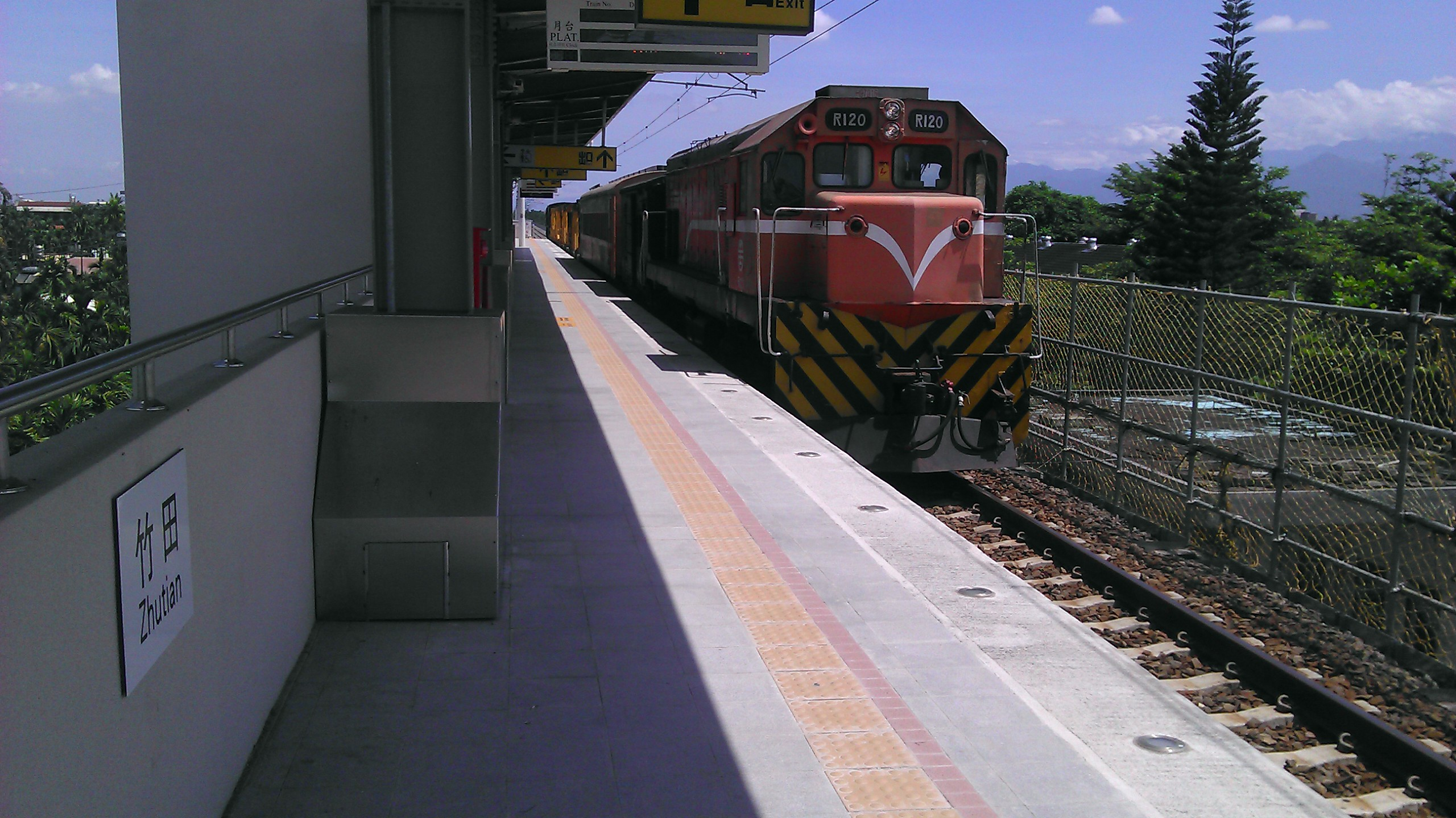 臺灣鐵路管理局柴電機車R120停靠竹田車站第二月台。